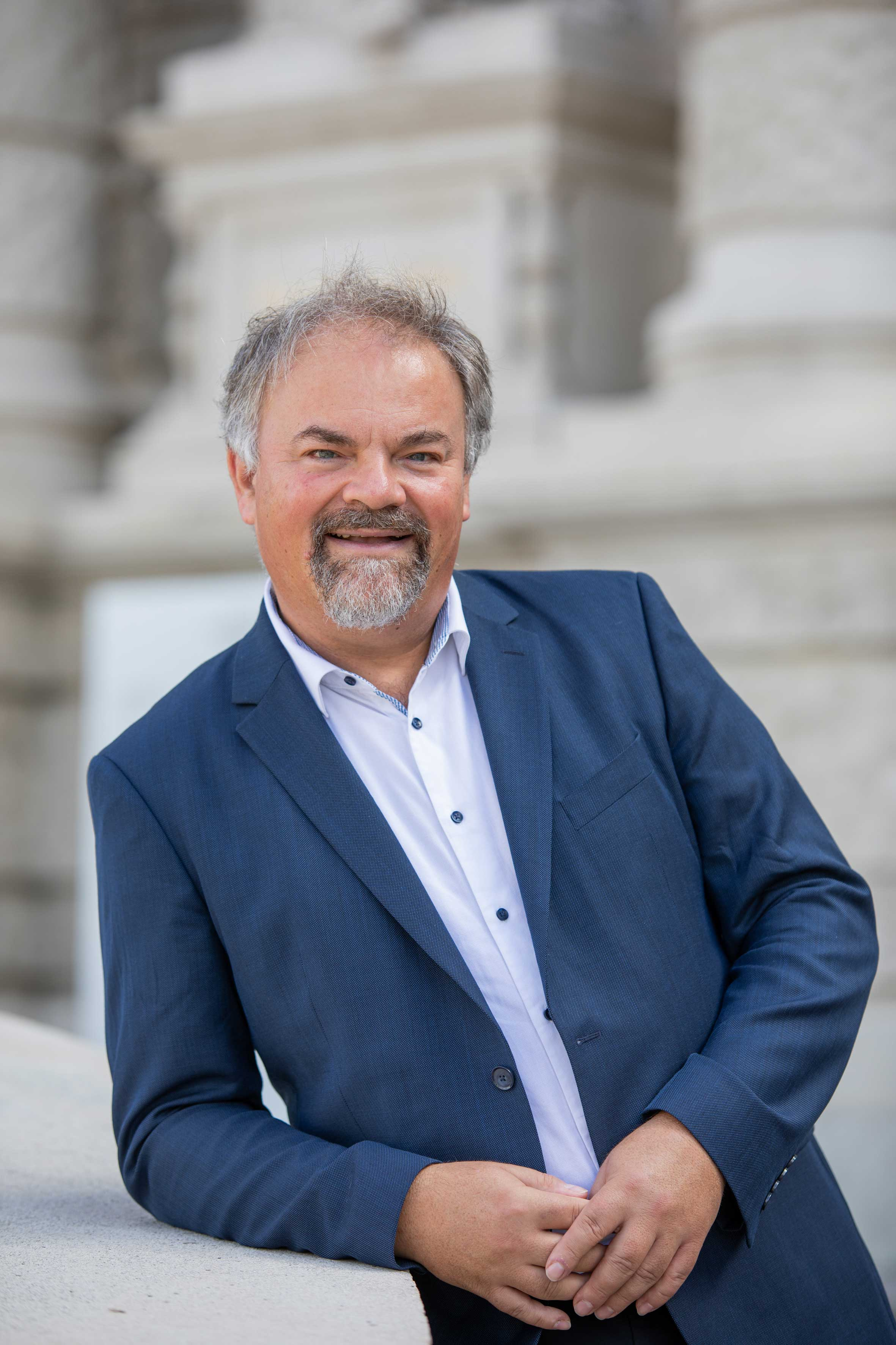 Jürgen Knoblich (c)IMBA/Sandra Schartel